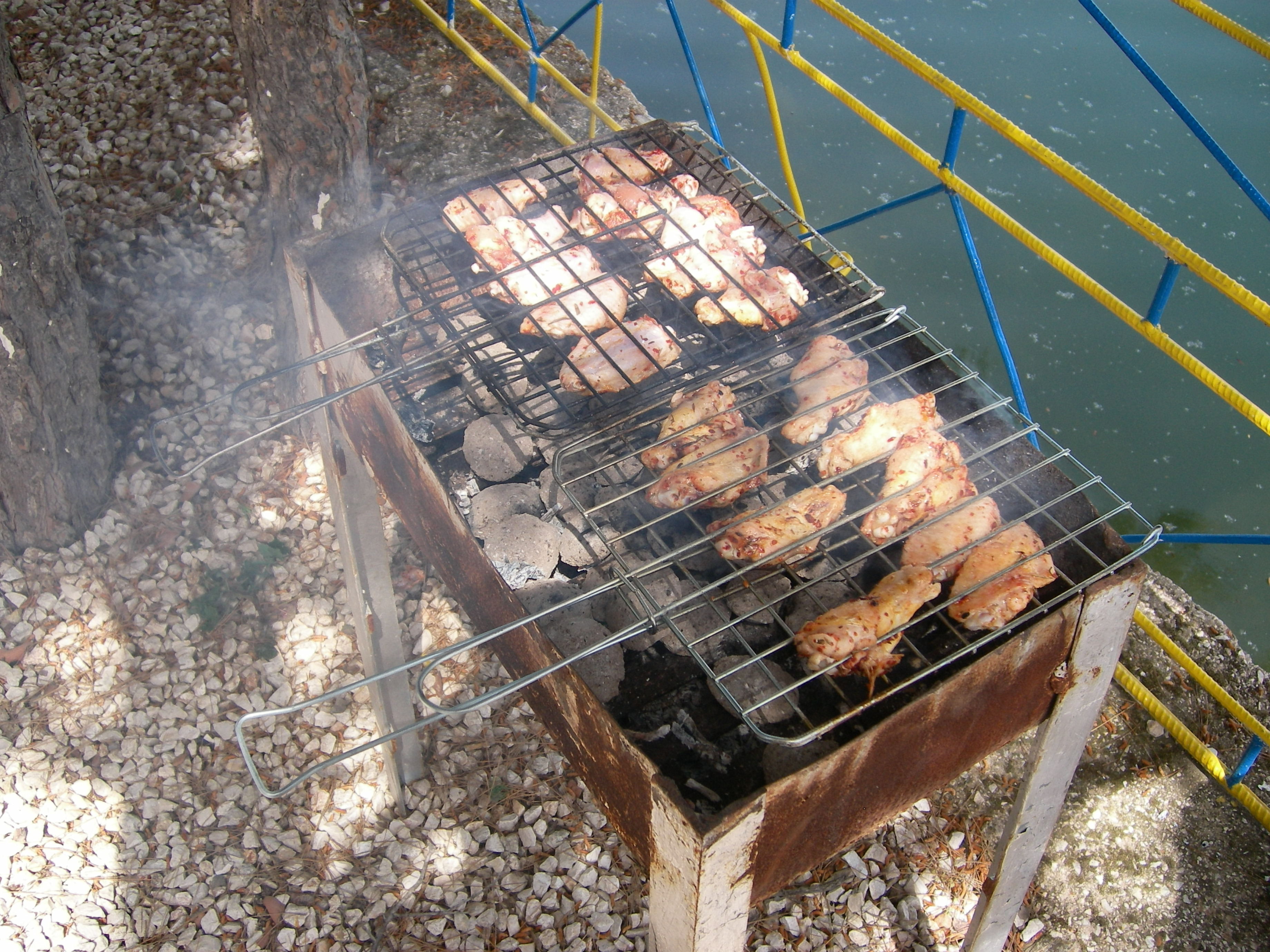 Açık hava mangalda tavuk kanadı